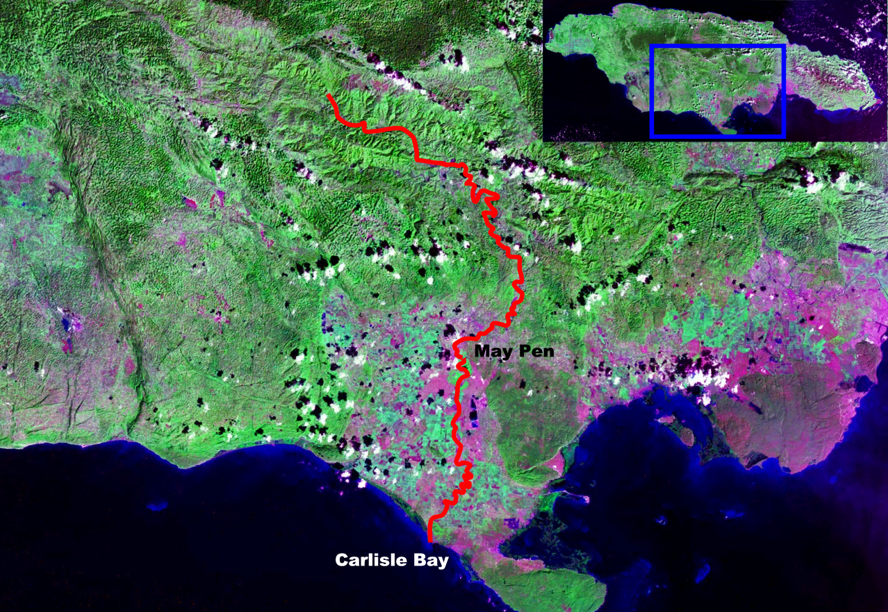 Rio Minho in jamaica